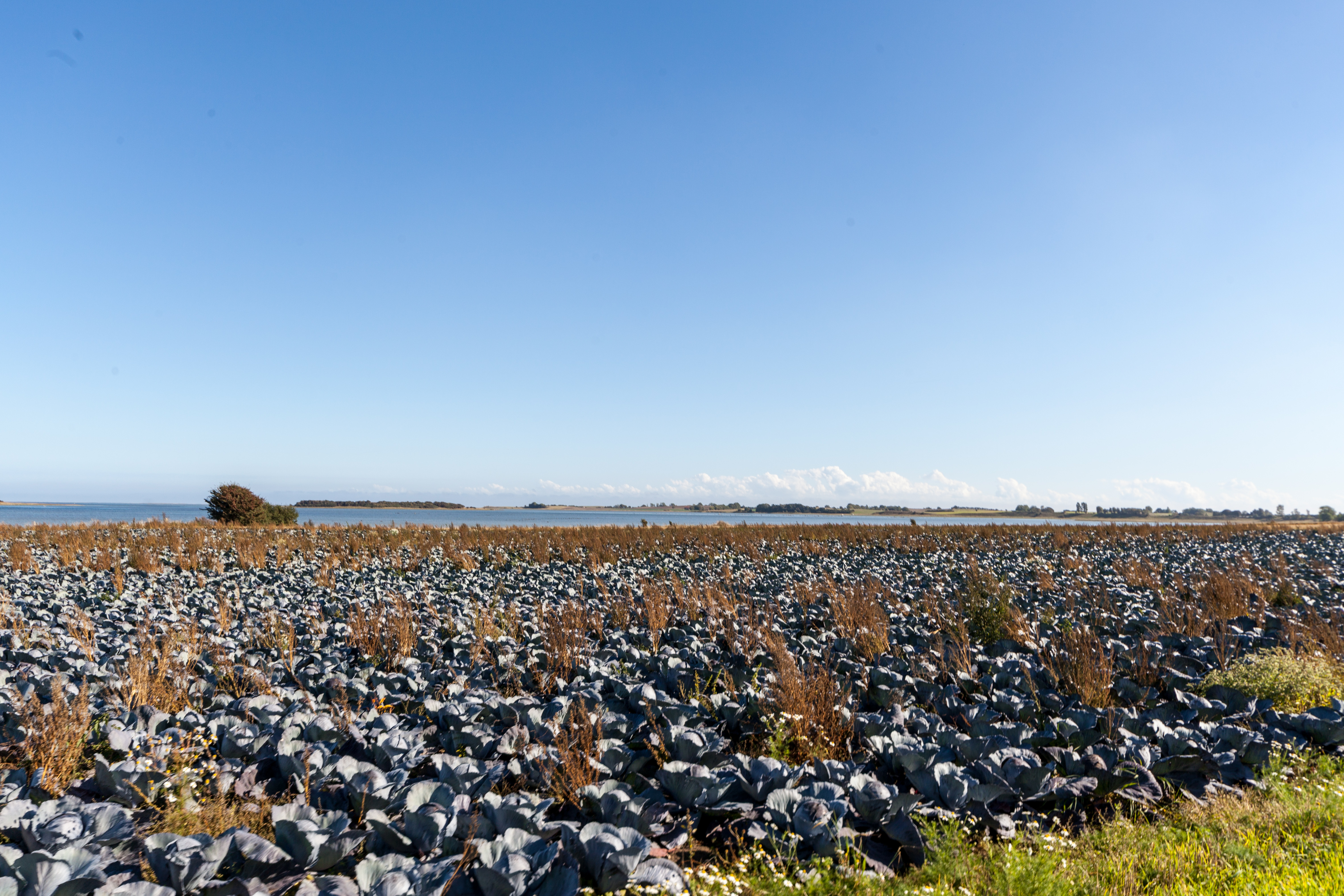 Samsø field